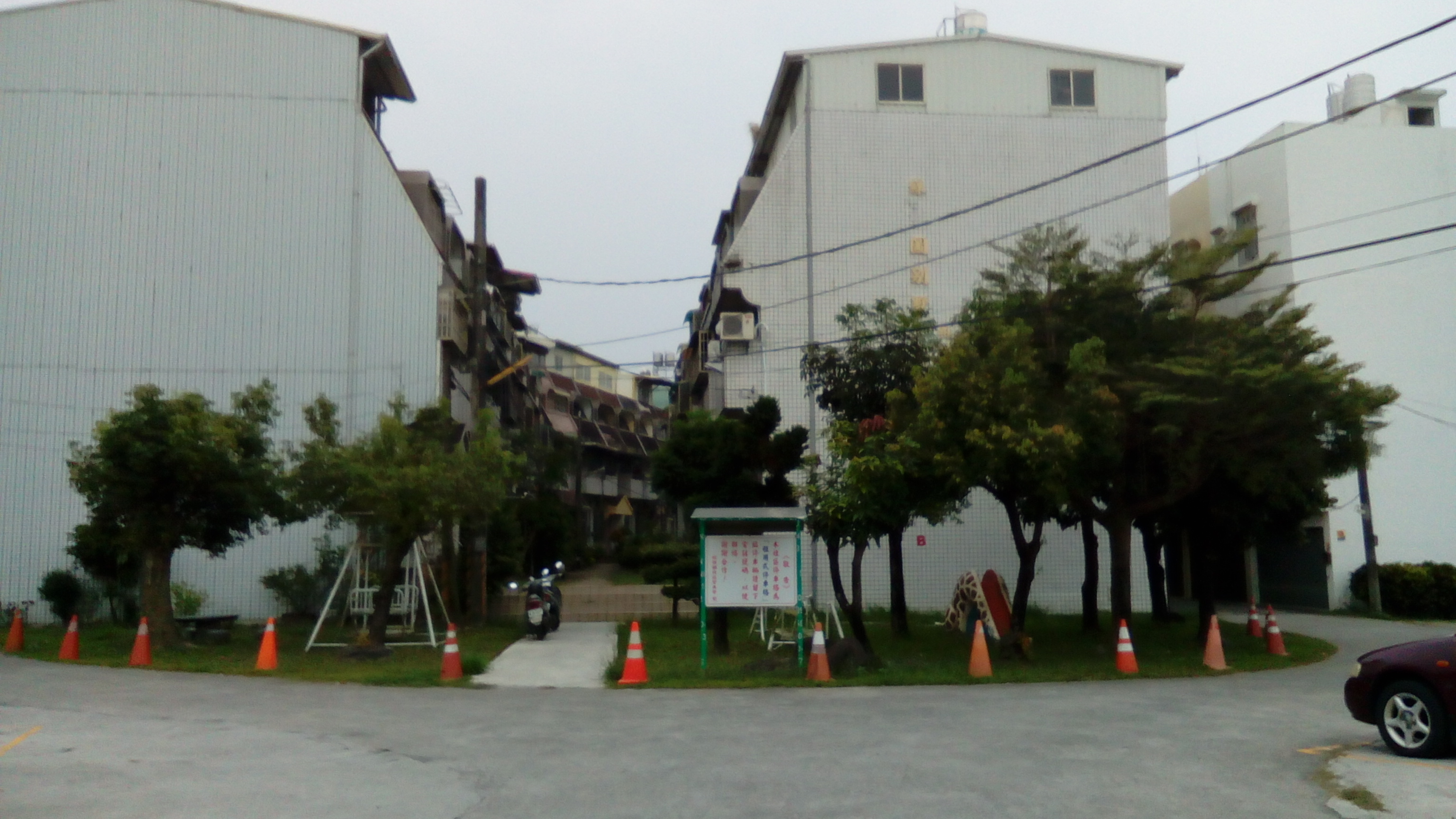 同上